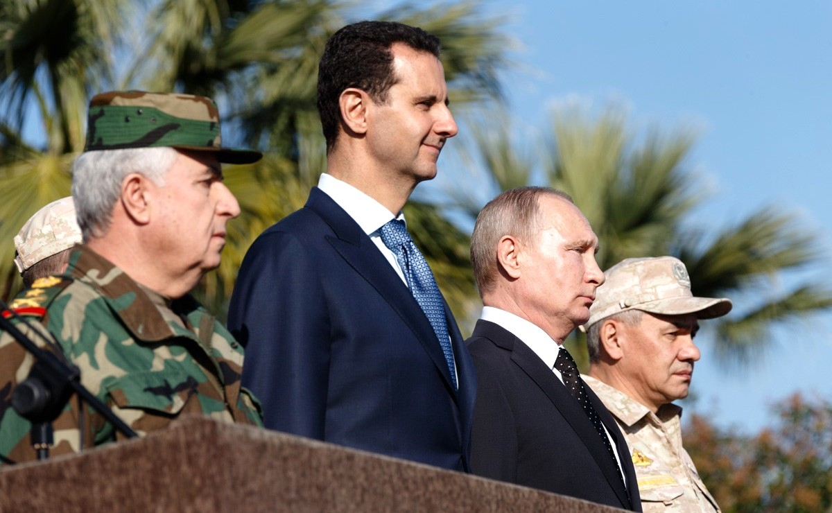 Президент Сирии Башар Асад, Президент России Владимир Путин, Министр обороны России Сергей Шойгу на российской авиабазе Хмеймим